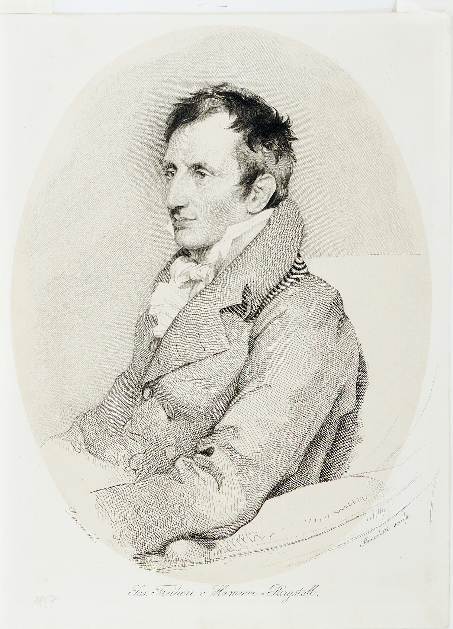 Porträt Joseph von Hammer-Purgstall. (1774 Graz – 1856 Wien). Kupferstich von Tommaso Benedetti (um 1857). nach einer Zeichnung von Thomas Lawrence